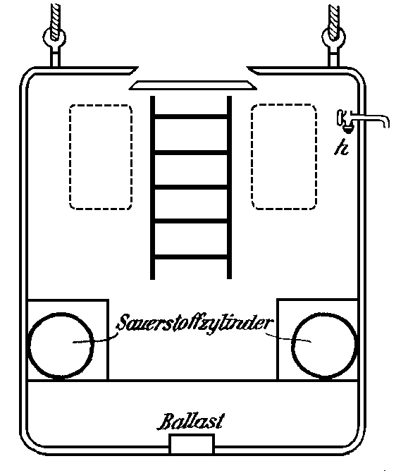 Skizze einer Druckkabine nach Hermann von Schrötter († 1928)